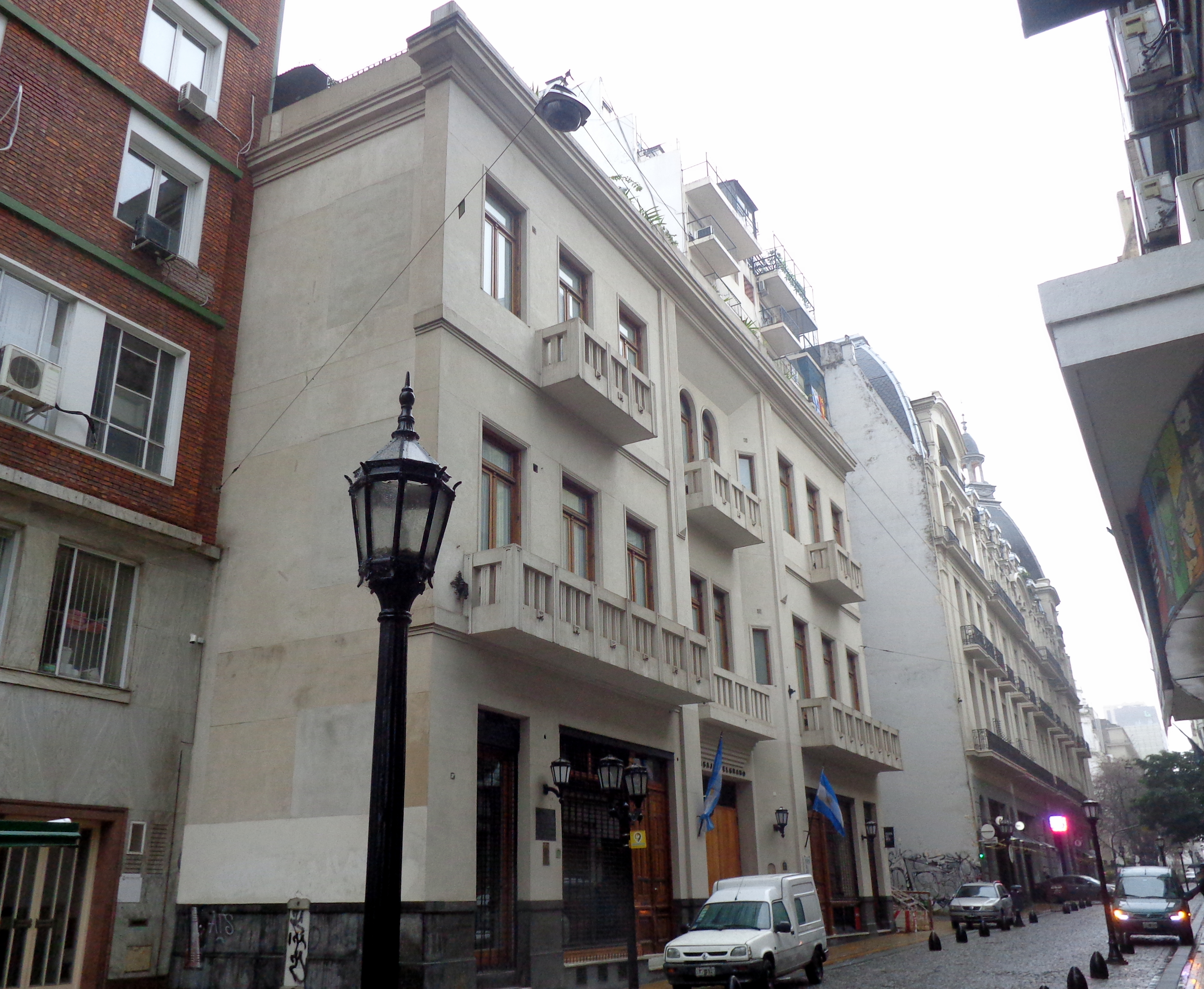 Pasaje Belgrano, en Bolivar esquina Belgrano, Buenos Aires, Argentina.